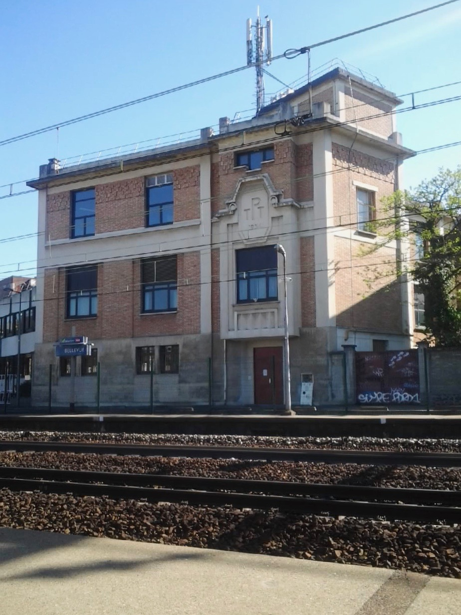 Central téléphonique Observatoire - Meudon (92), 5 avenue du 11 Novembre - Avril 2014.